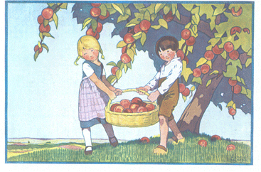 Carte-image pour les écoles sur le thème des régions. La Normandie, représentée par deux enfants cueillant des pommes. Librairie Gedalge, Paris.